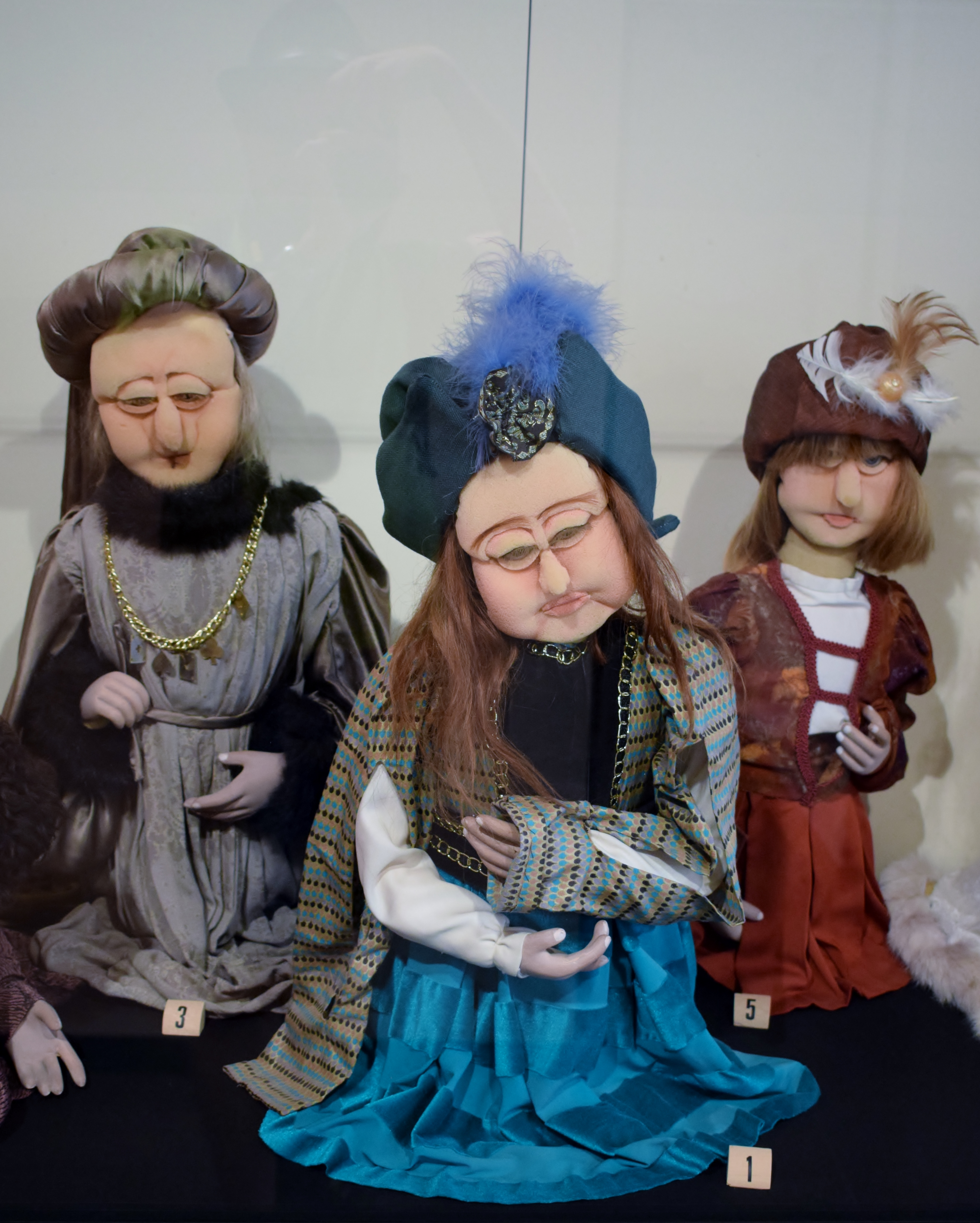 Titelles dissenyades per a la producció televisiva «Tirant lo Blanc» (1991) de la qual es va produir només el capítol pilot (de tretze previstos).